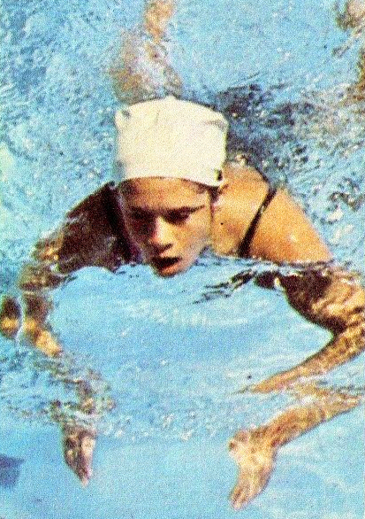 CAMPIONI dello SPORT 1970/71-n.229- CATIE BALL - NUOTO